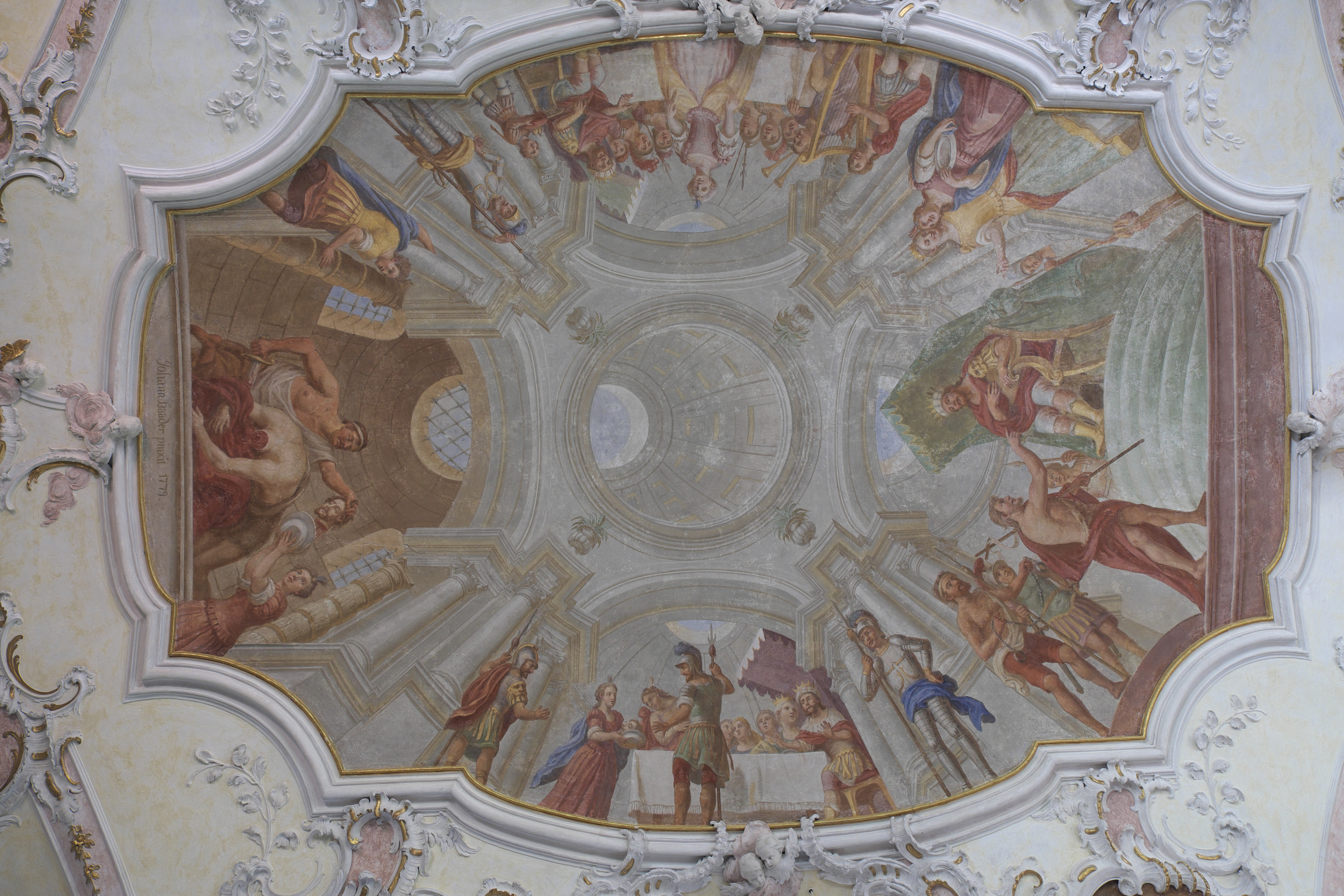 Katholische Pfarrkirche St. Johannes der Täufer in Rott im Landkreis Landsberg am Lech (Bayern/Deutschland), Fresken im Langhaus von Johann Baptist Baader, von 1779; Darstellung: Johannes vor Herodes und Enthauptung des Johannes des Täufers